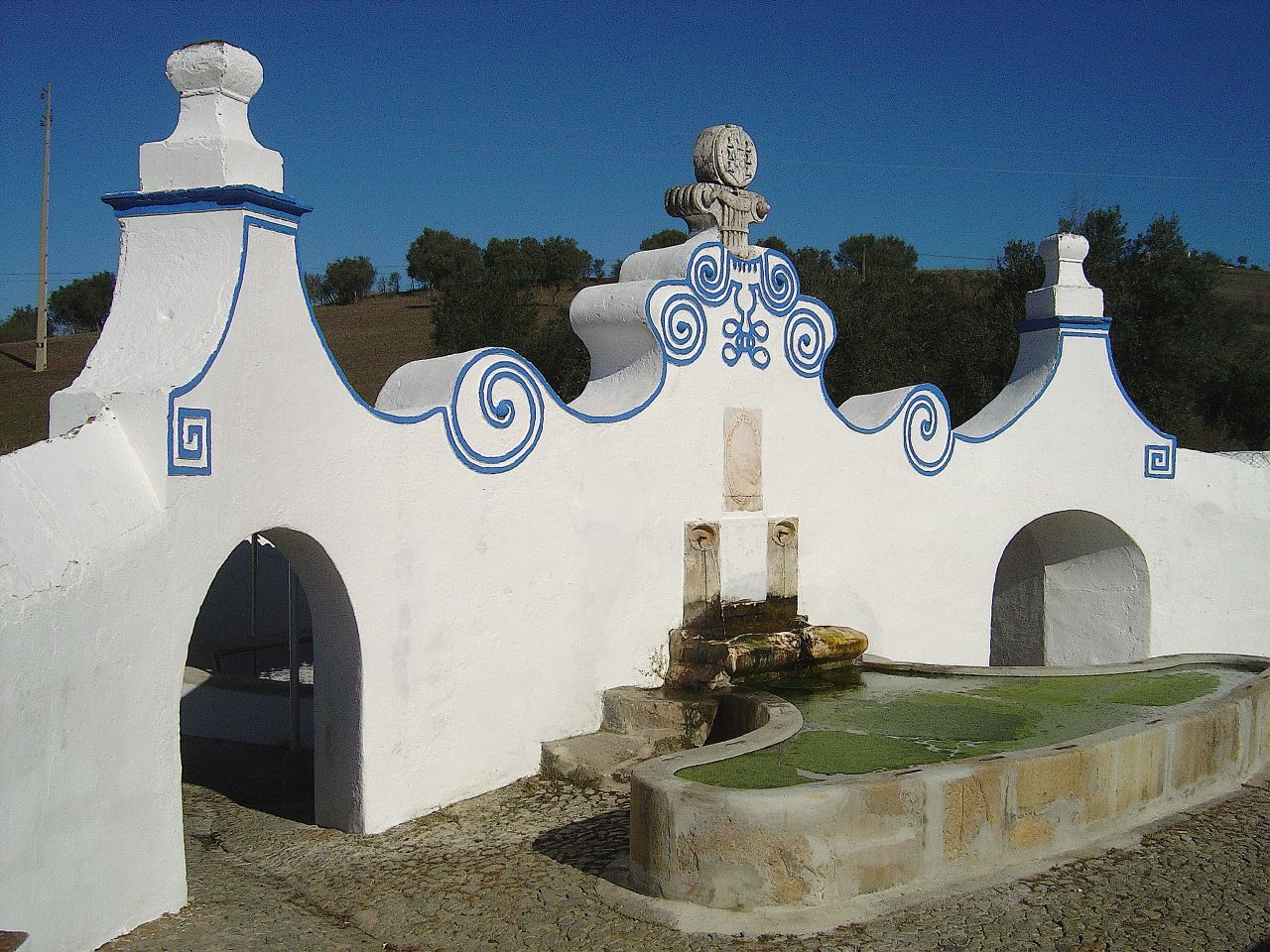 Fonte dos Almocreves - Arraiolos - Portugal